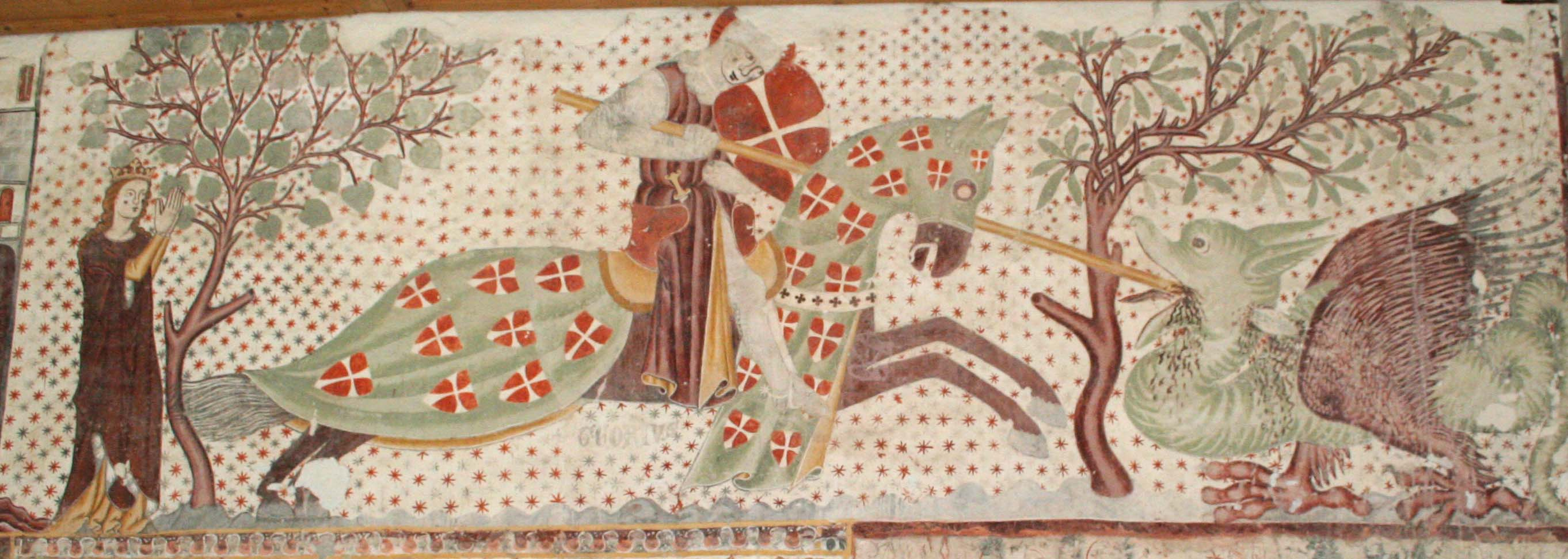 Kampf Georgs mit dem Drachen